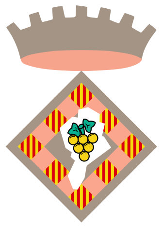 Emblema del Consell Comarcal de la Terra Alta